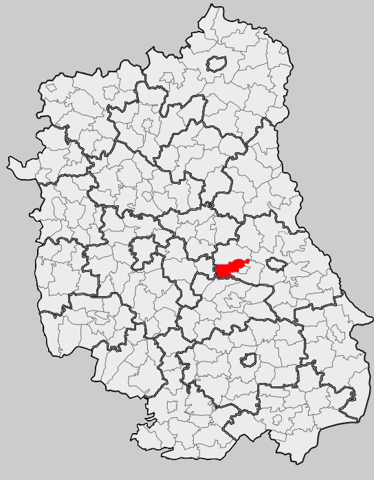 Map of gmina Rejowiec Fabryczny (rural), Chełm county, Lublin voivodship Mapa gminy Rejowiec Fabryczny (wiejska), powiat chełmski, województwo lubelskie